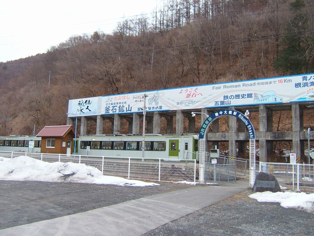 Rikuchū-Ōhashi Station, Kamaishi, Iwate, Japan